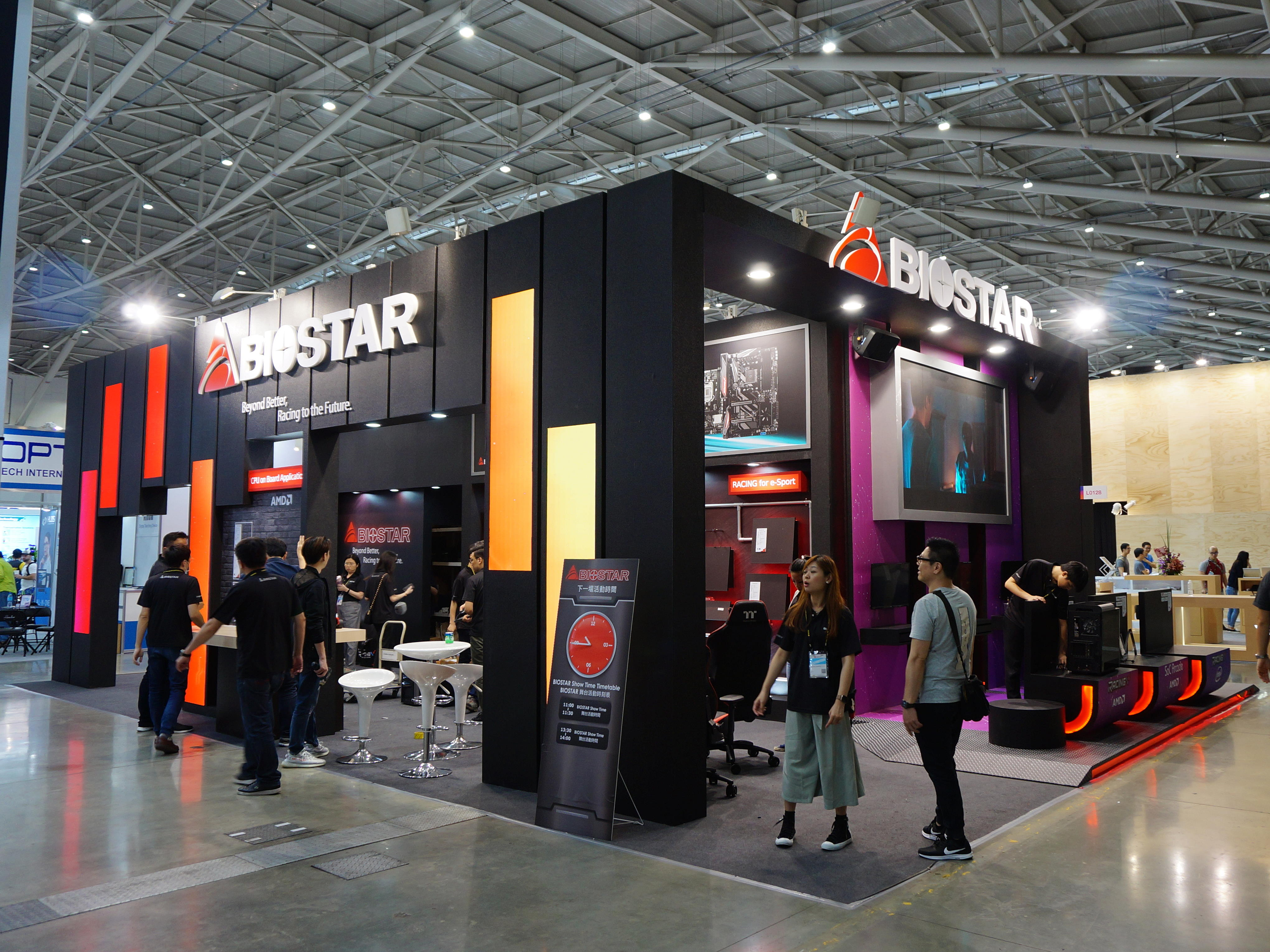 2019台北國際電腦展，映泰攤位。